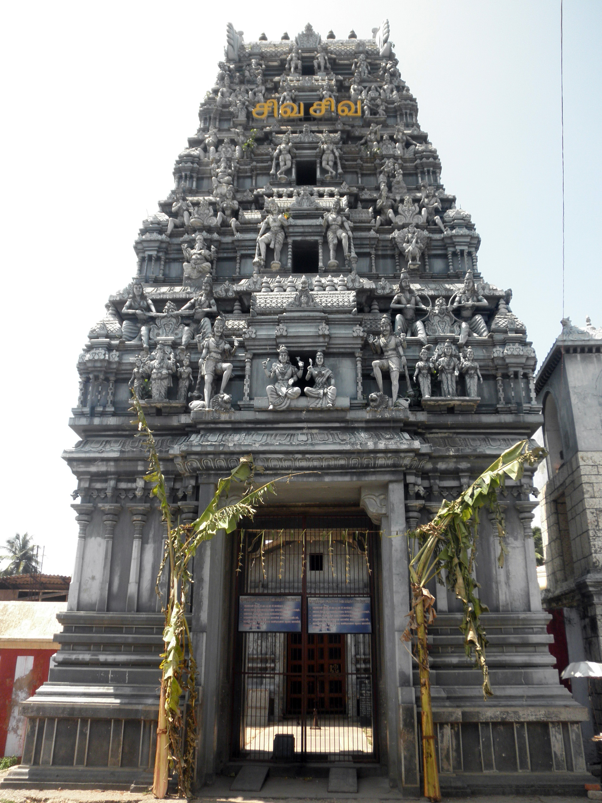 Vaitheeswara kovil, Jaffna